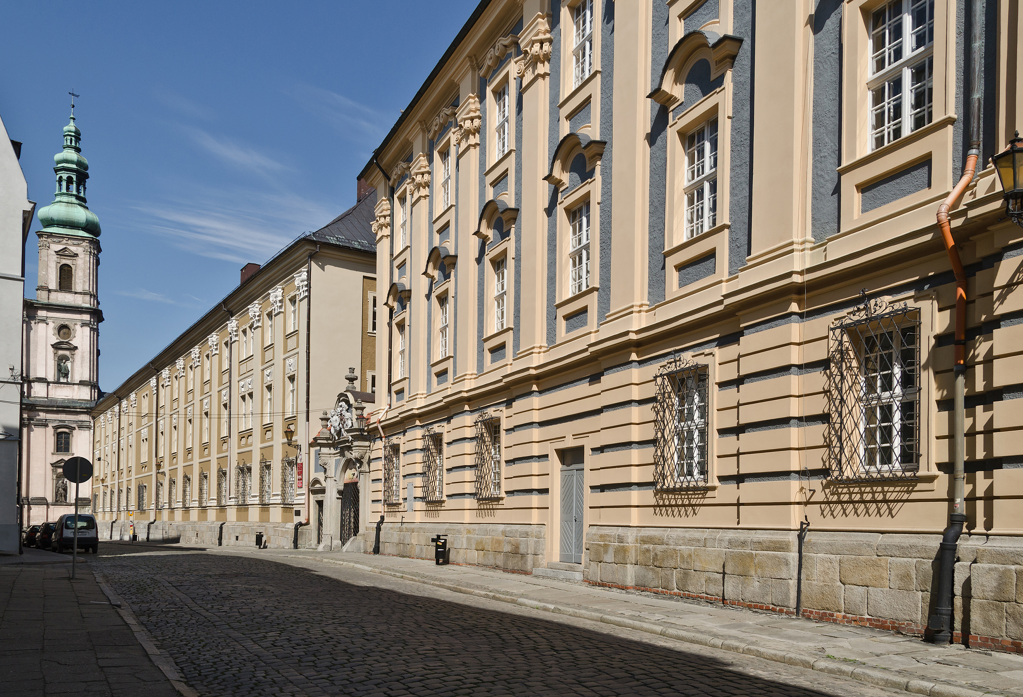 Nysa, gimnazjum Carolinum, ob. LO im. Jana III Sobieskiego, 1722-1725